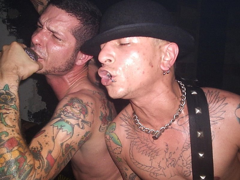 Blind Pigs no Rio de Janeiro